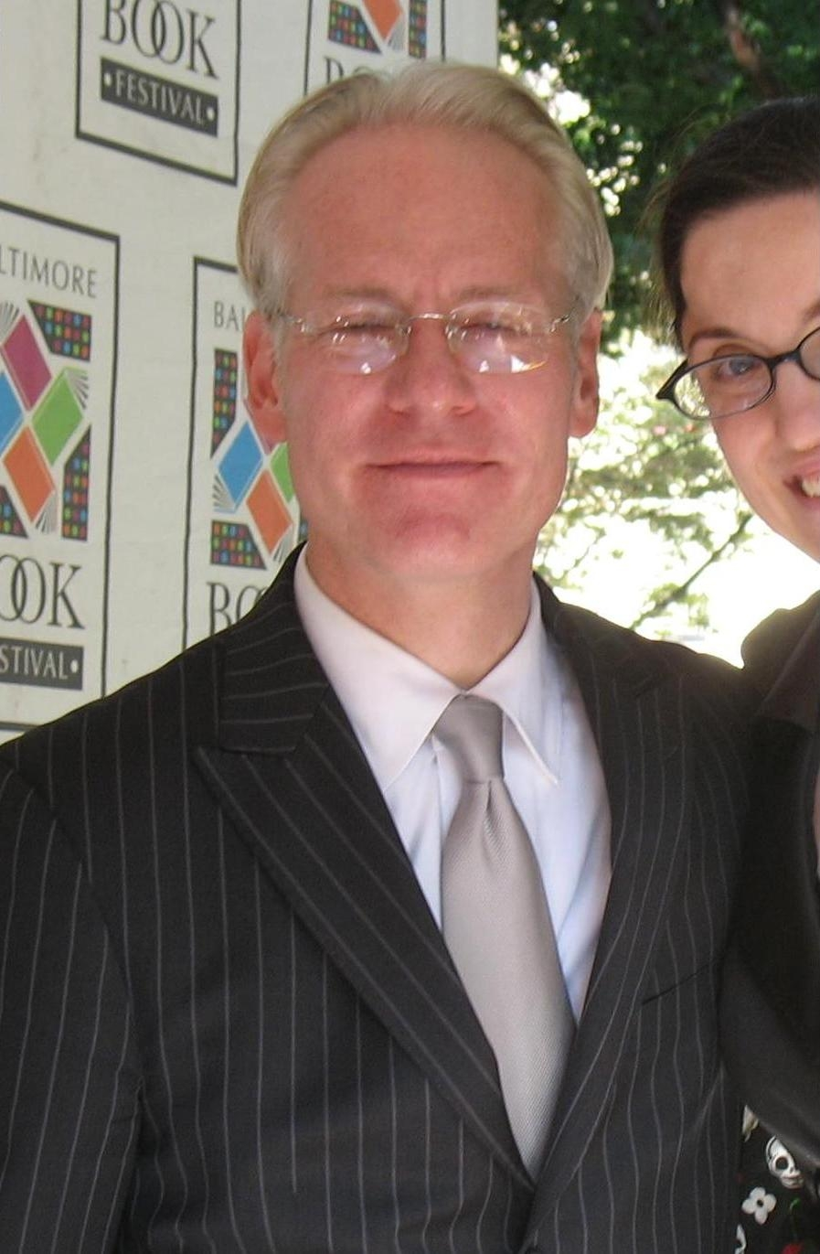 Tim Gunn